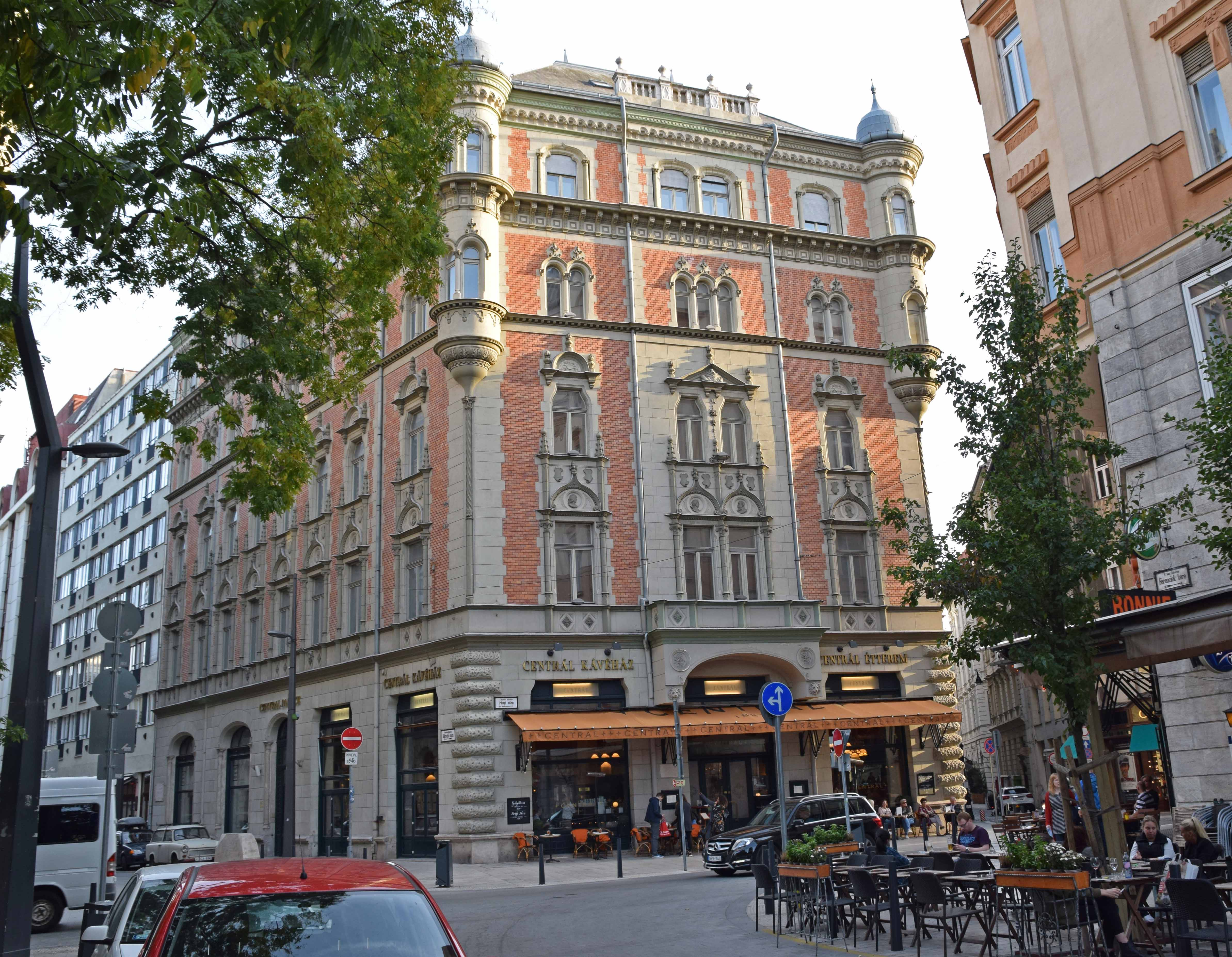 Centrál Kávéház és Étterem 1887, Central Café, Károlyi utca 9, District V, BudapestKárolyi utca 9